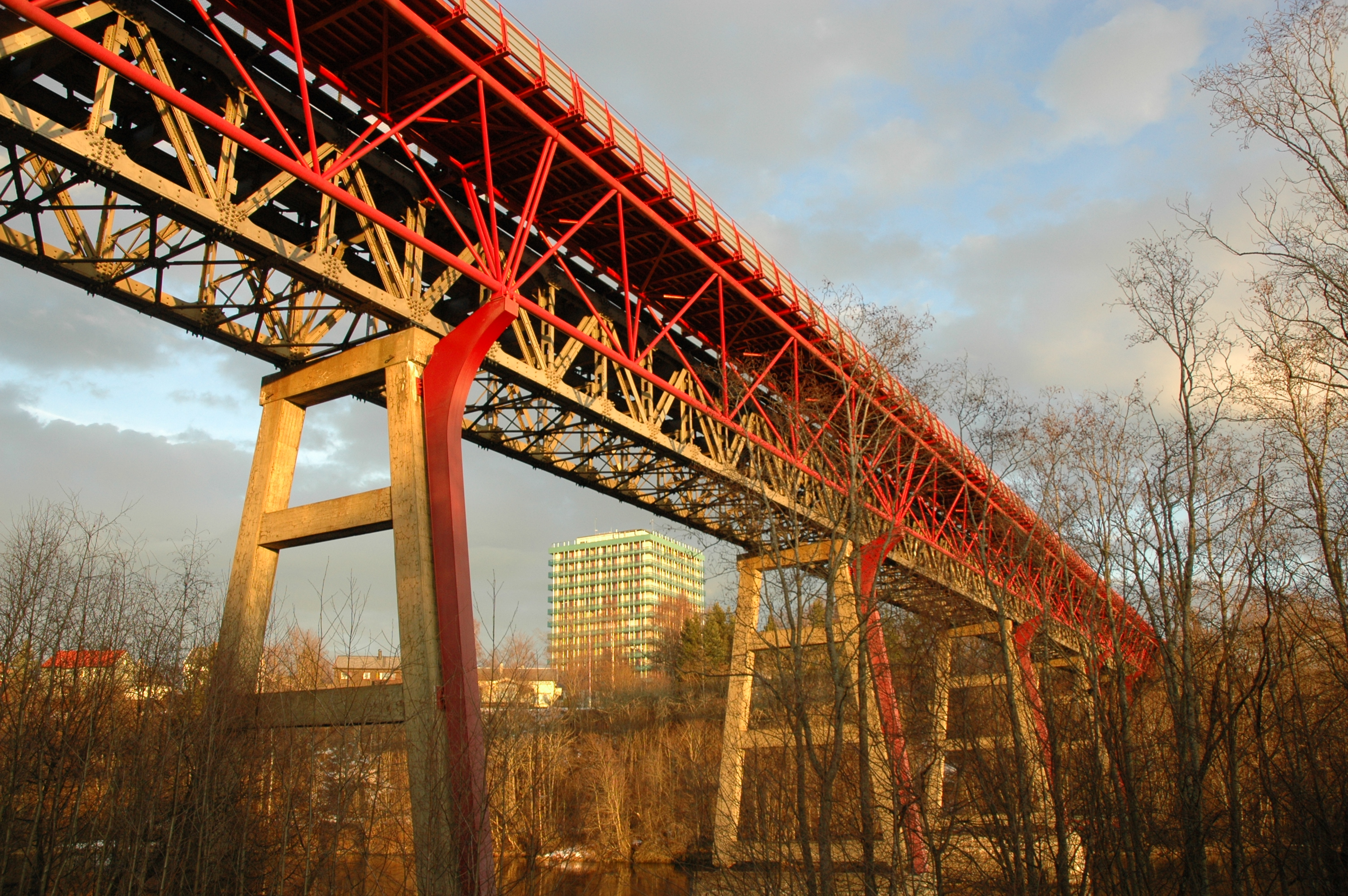 Stavne bro in Trondheim, Norway